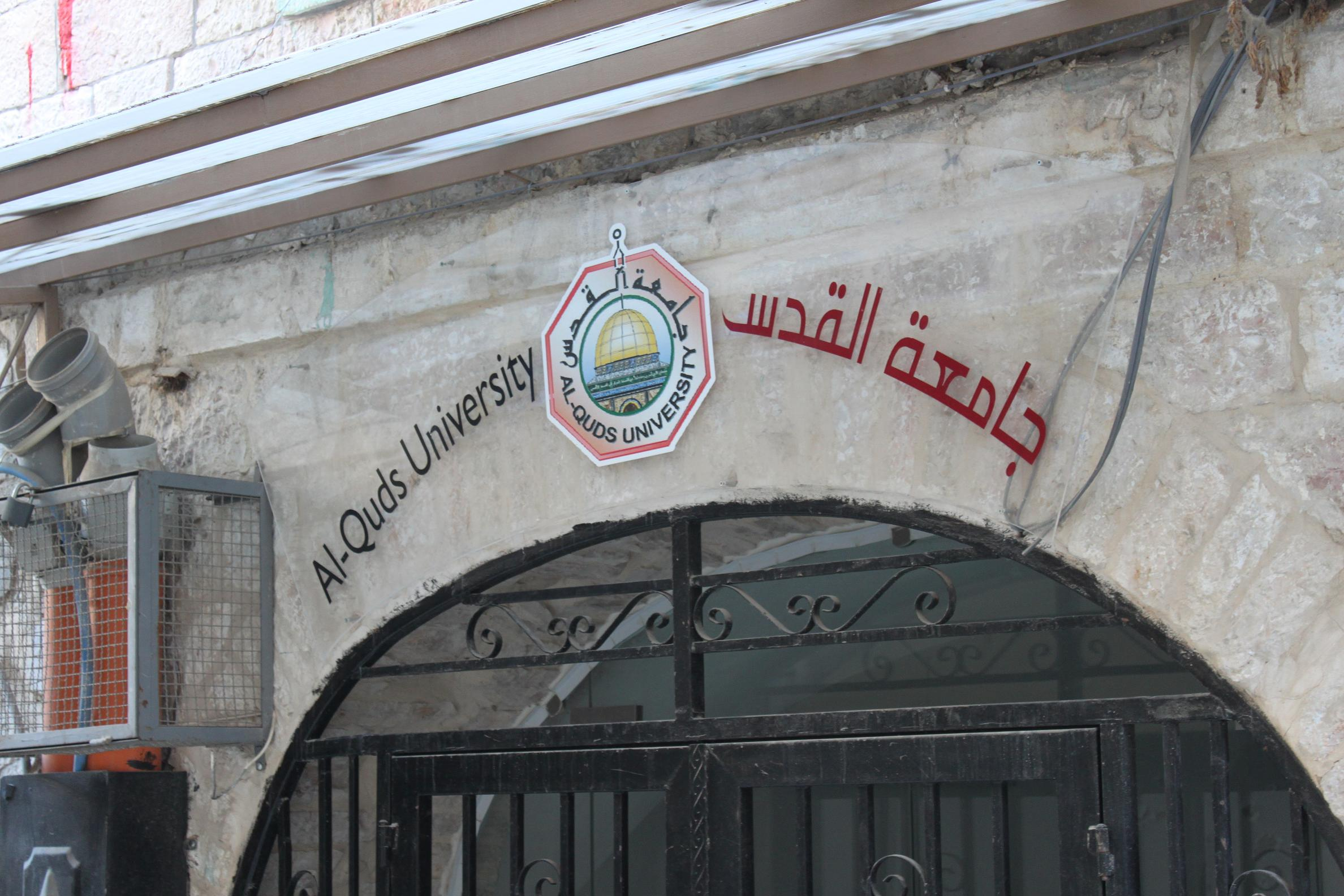 אוניברסיטת אל-קודס בירושלים, הרובע המוסלמי בעיר העתיקה